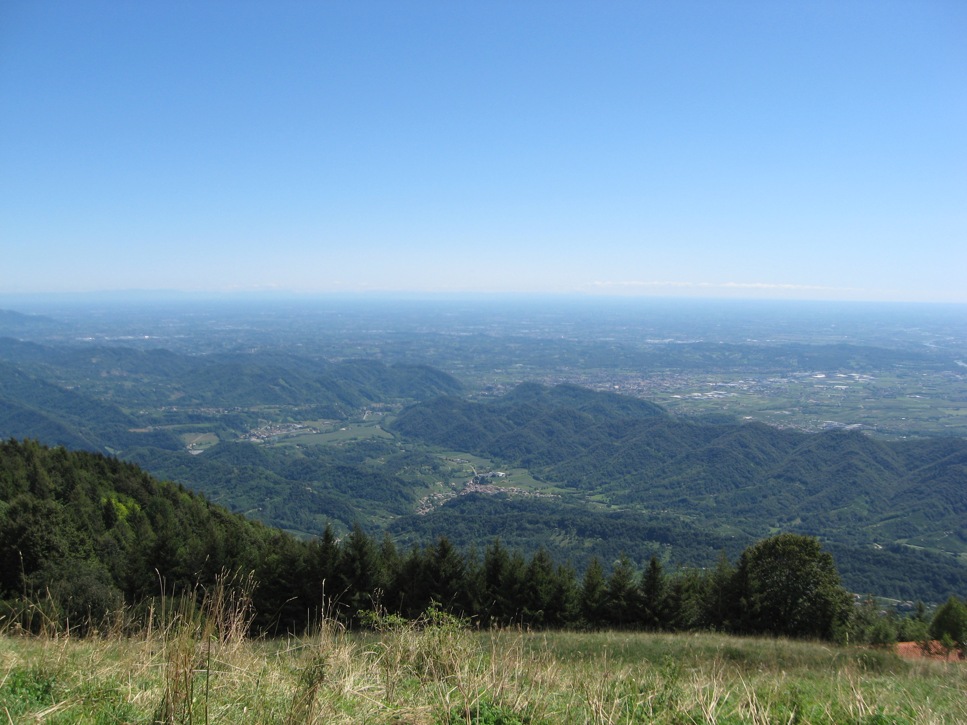 colli trevigiani visti dal monte Cesen